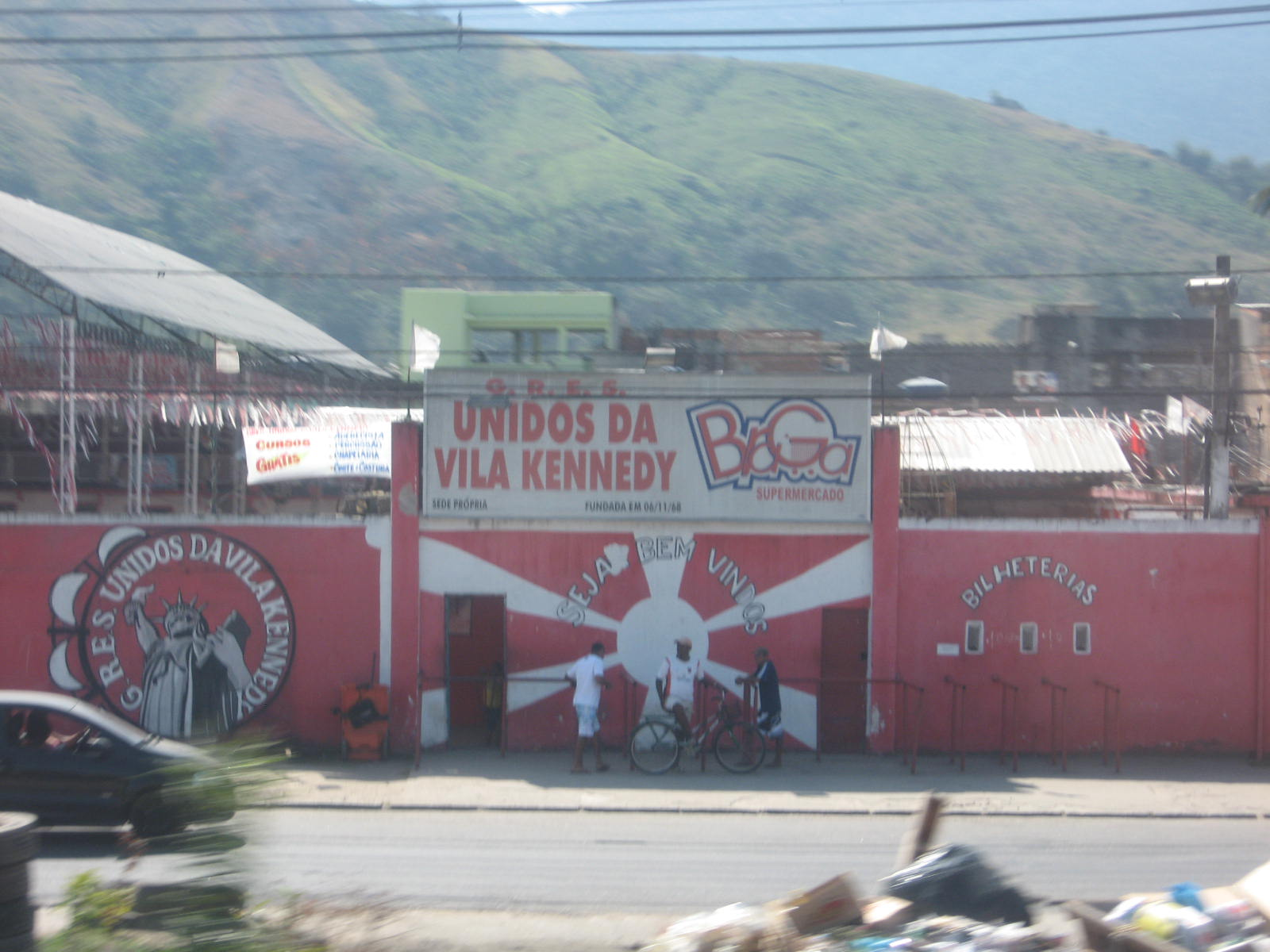 Vista da sede da escola de samba Unidos da Vila Kennedy.